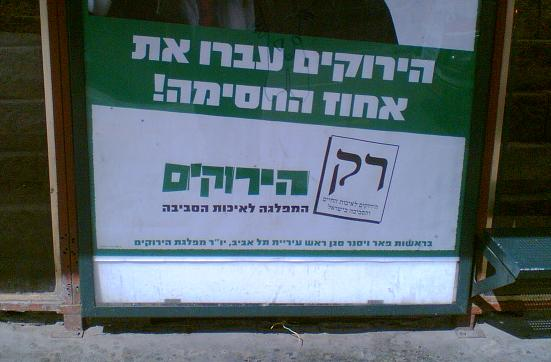 מפלגת הירוקים על אחוז החסימה. צילם דוד שי.